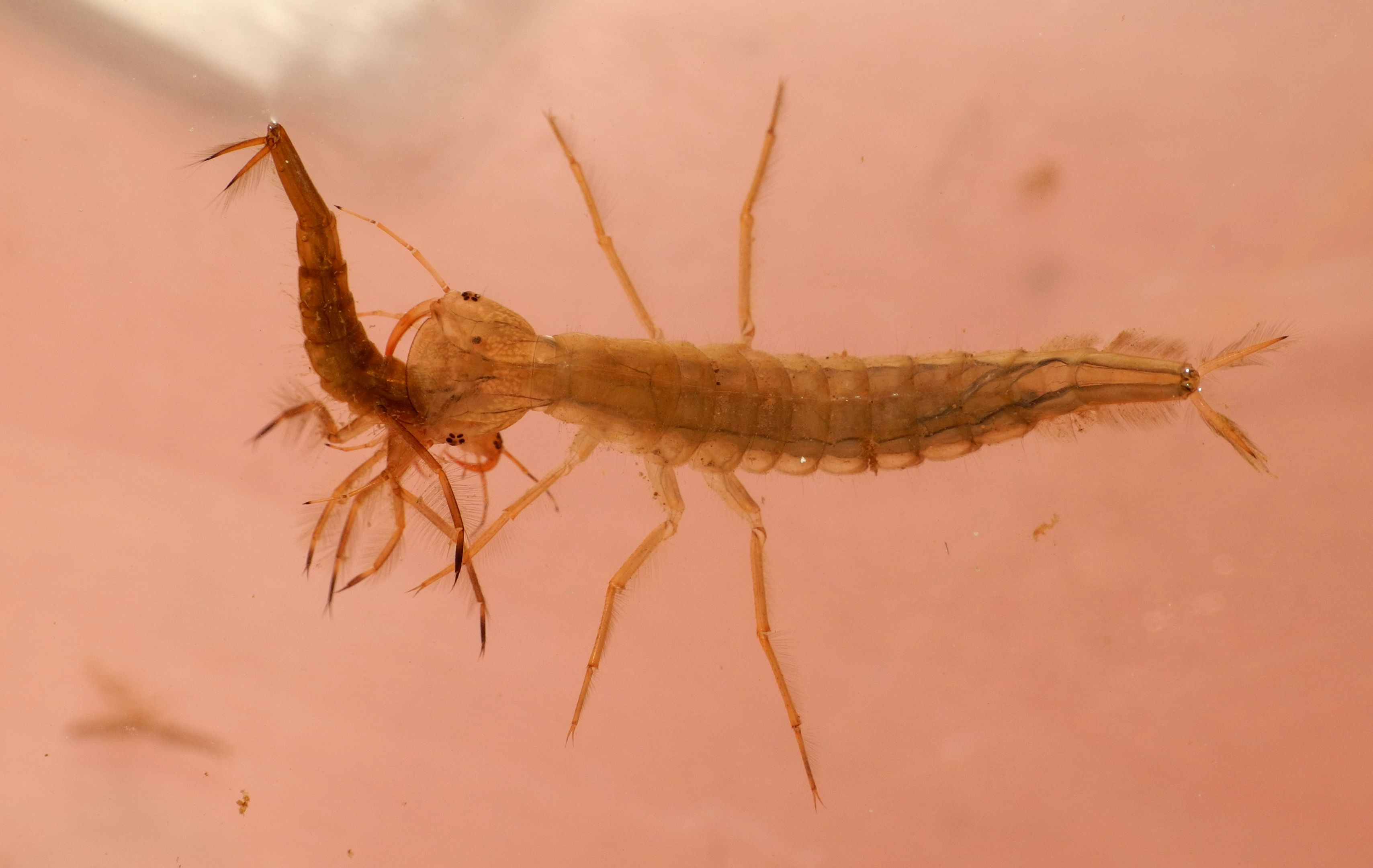 Larve de dytique (Dytiscidae sp.) mangeant une autre larve de dytique. Image prise avec la bonnette Raynox DCR-250.